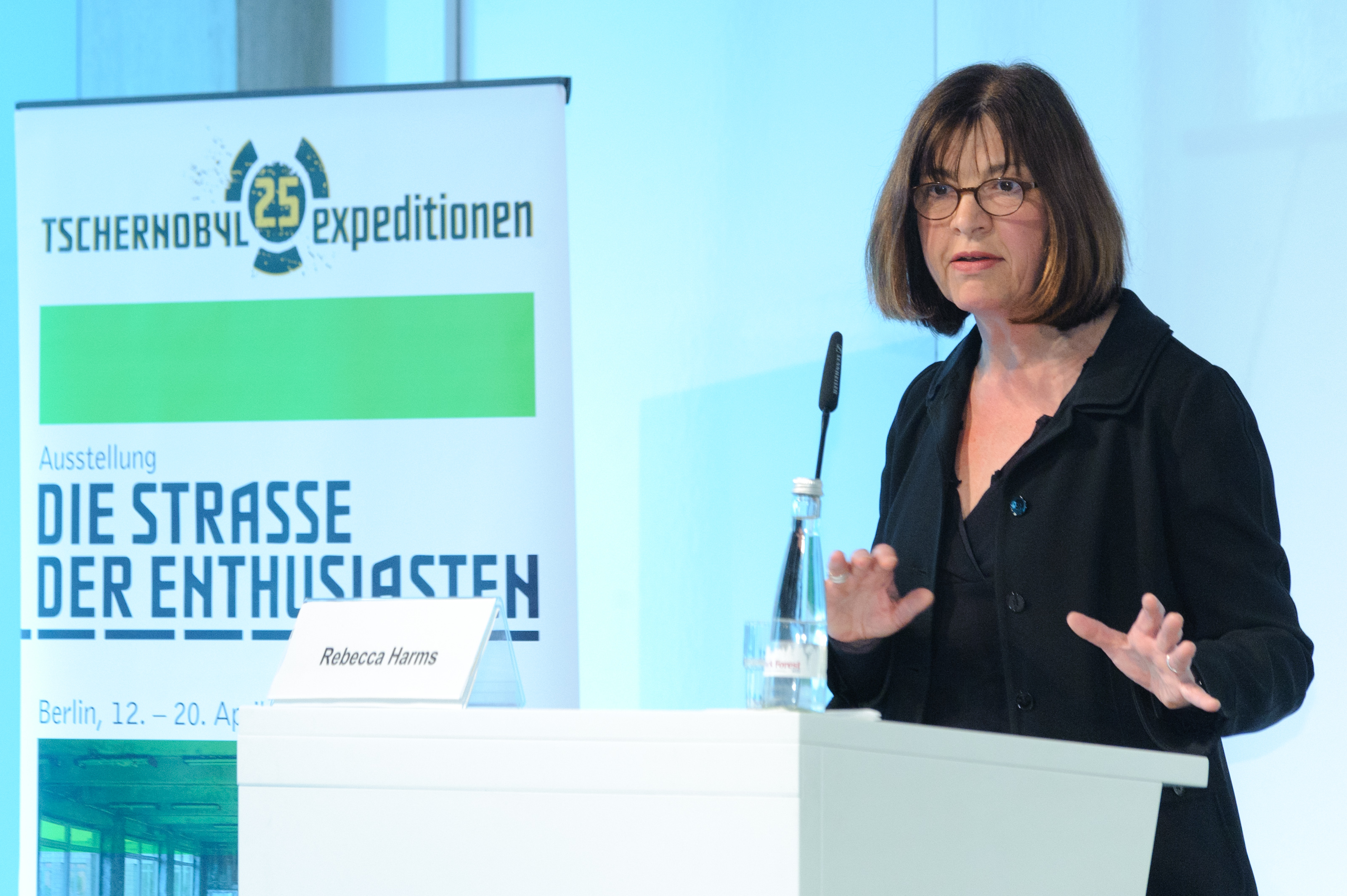 Rebecca Harms, MdEP Die Grünen/EFA Foto: Stephan Röhl